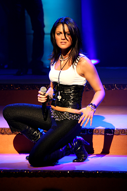 Belle Perez tijdens een concert in het Beatrix Theater in 2008